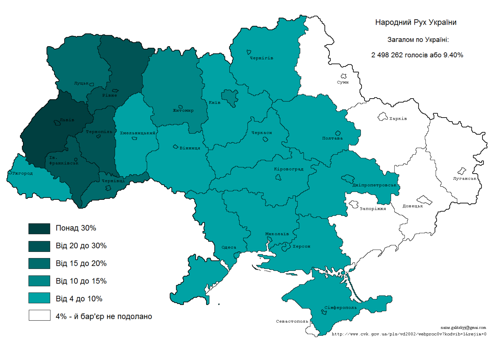 Рівень підтримки НРУ по областях